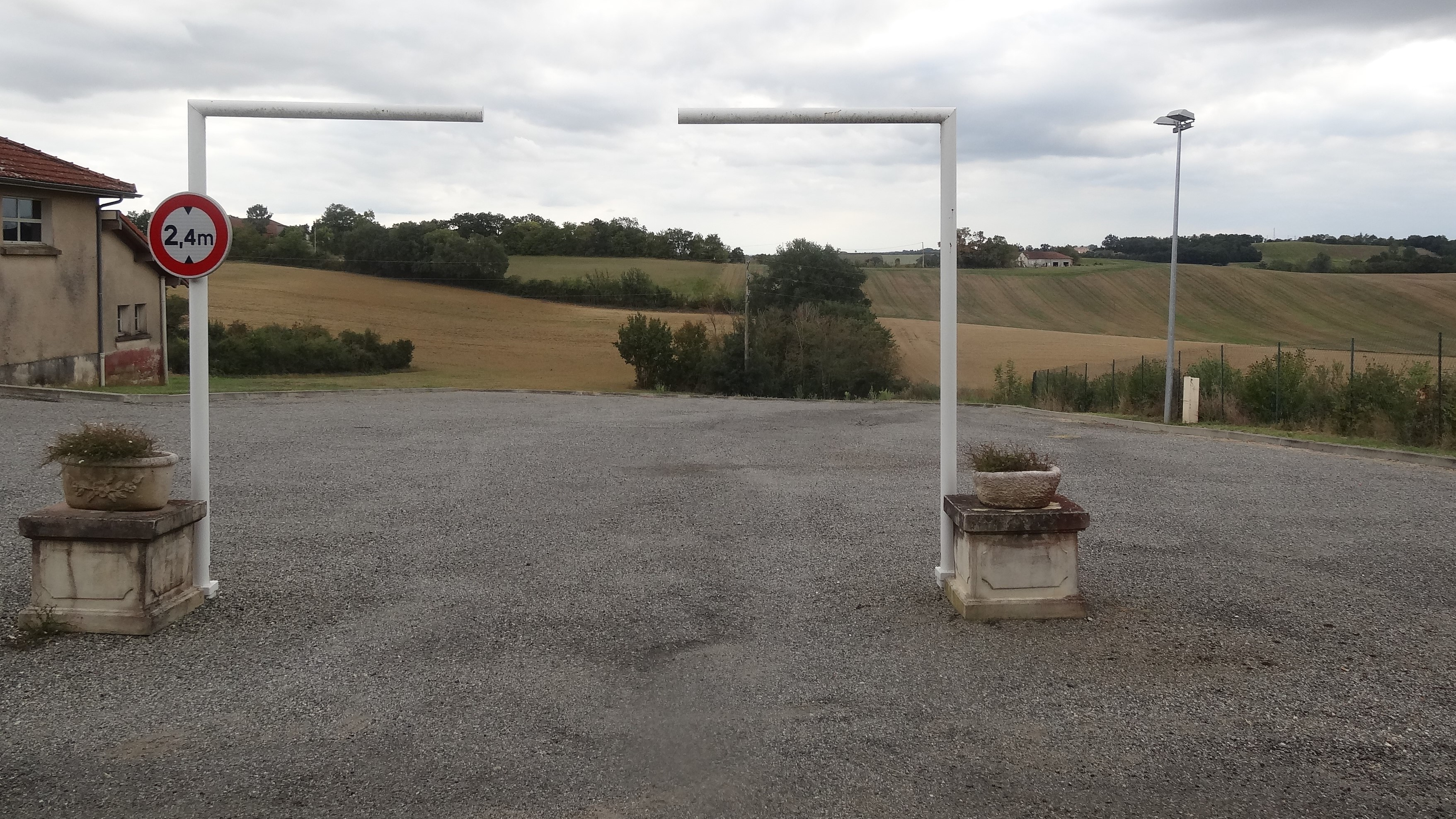 Parking à Saint-Caprais dans le Gers.